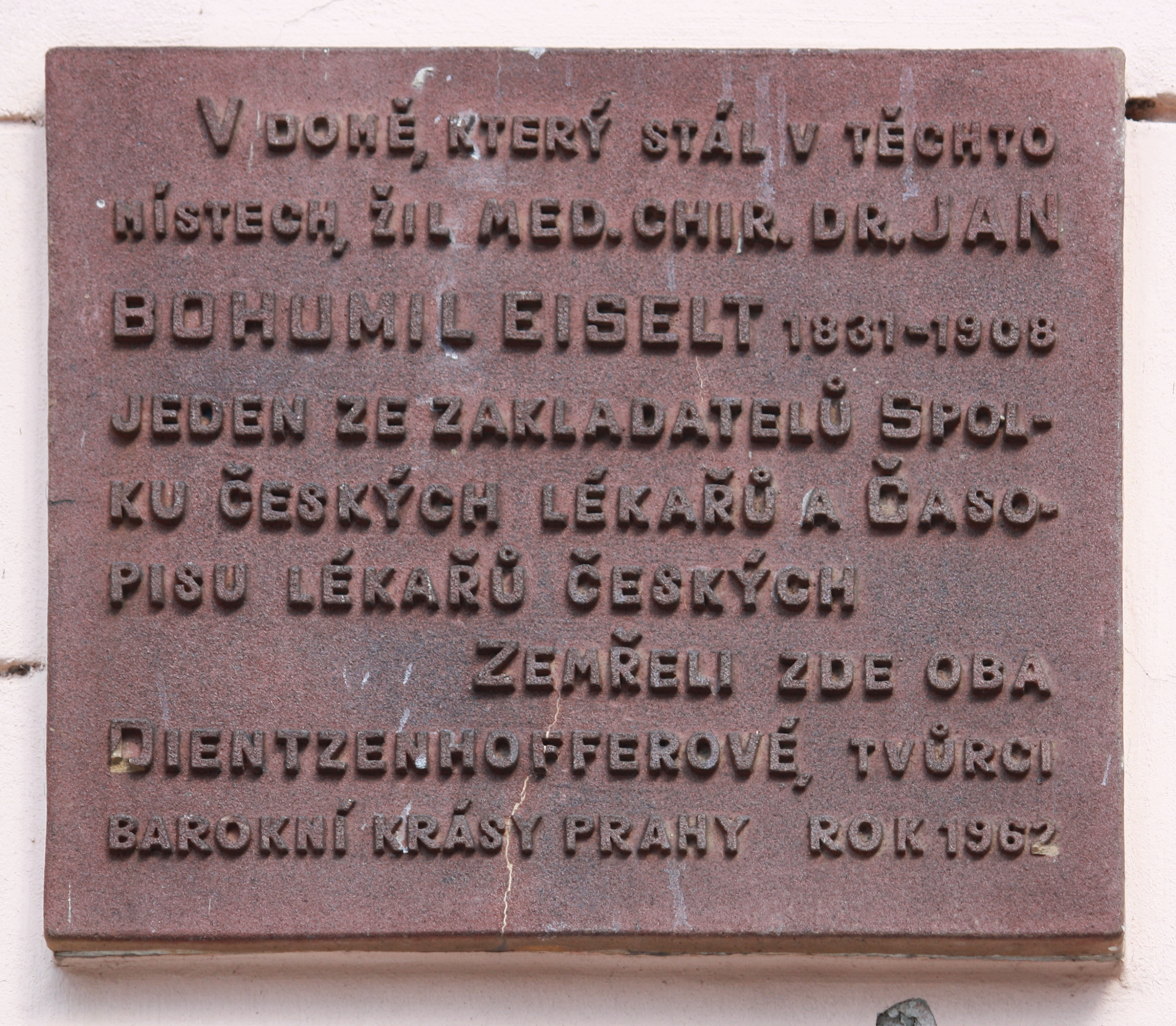 Pamětní deska v Helichově ulici 5/455 - Dr. Jan Bohumil Eiselt